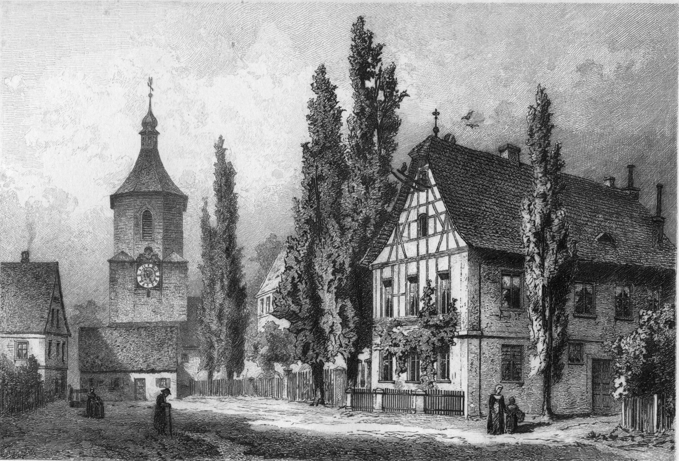 Kupferstich der Kirche und Pfarrhaus Neuendettelsau zur Zeit Löhes